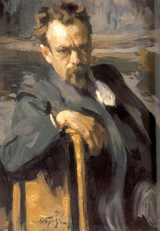 Портрет художника Сергея Васильевича Иванова